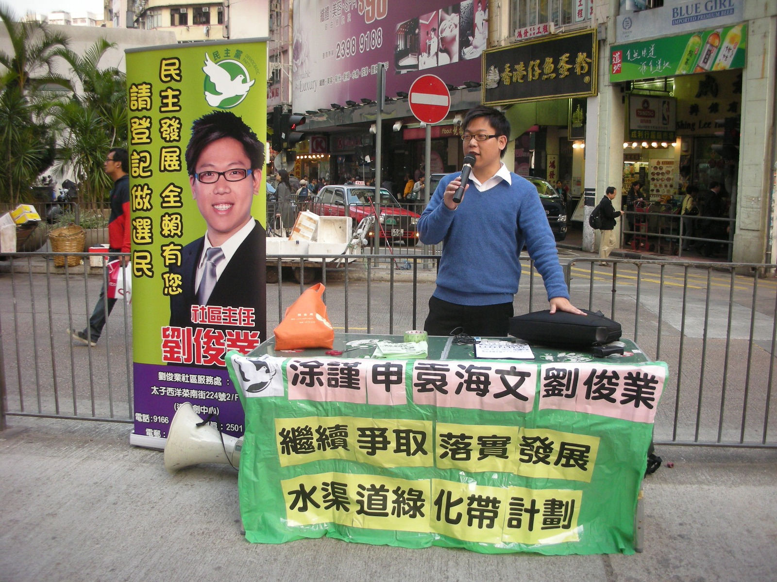 香港民主黨太子區社區主任劉俊業